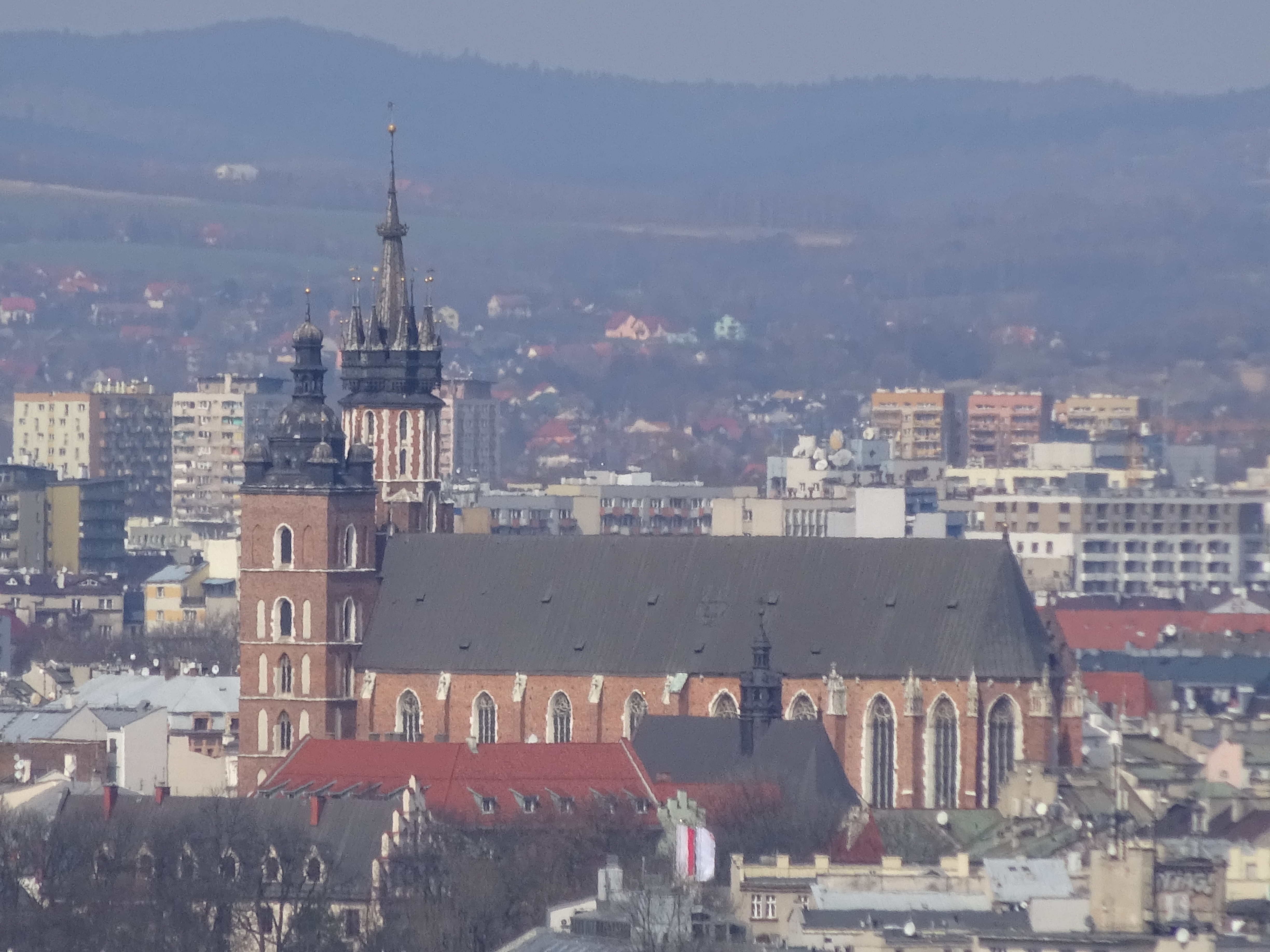 Widok na Kościół Mariacki z Kopca Kraka. Kraków, 2016.